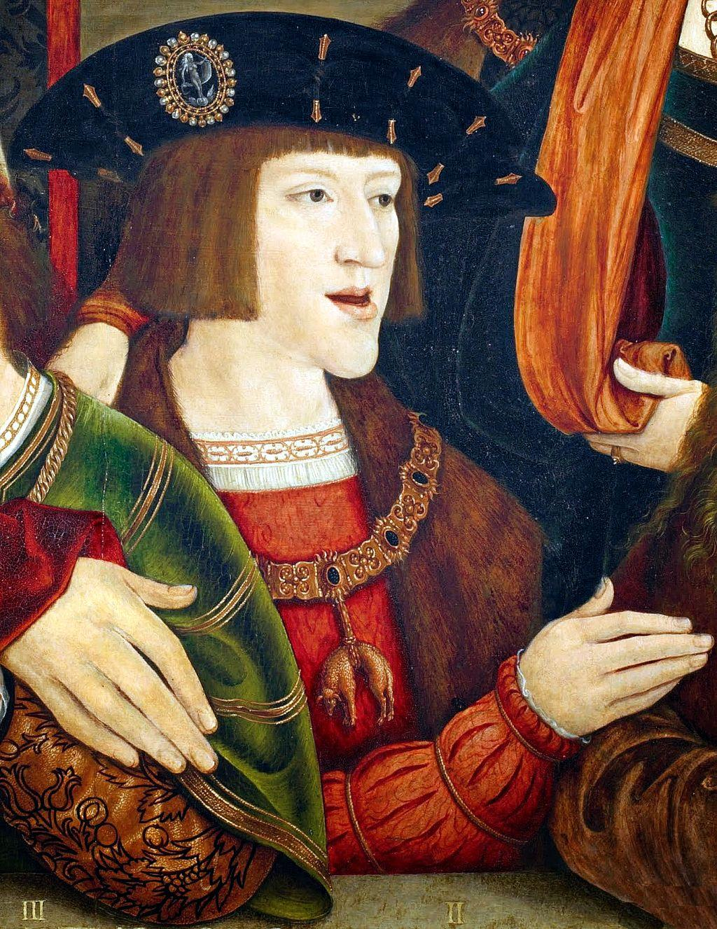 Detail van een portret van Karel V door Bernard Strigel. Hij schilderde de jonge vorst met zijn familie. Karel draagt het Gulden Vlies.